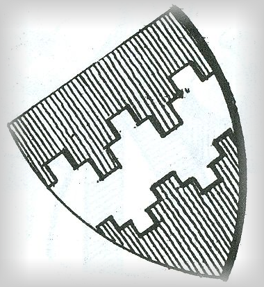 Wappen der Walchen nach Siebmachers Wappenbuch